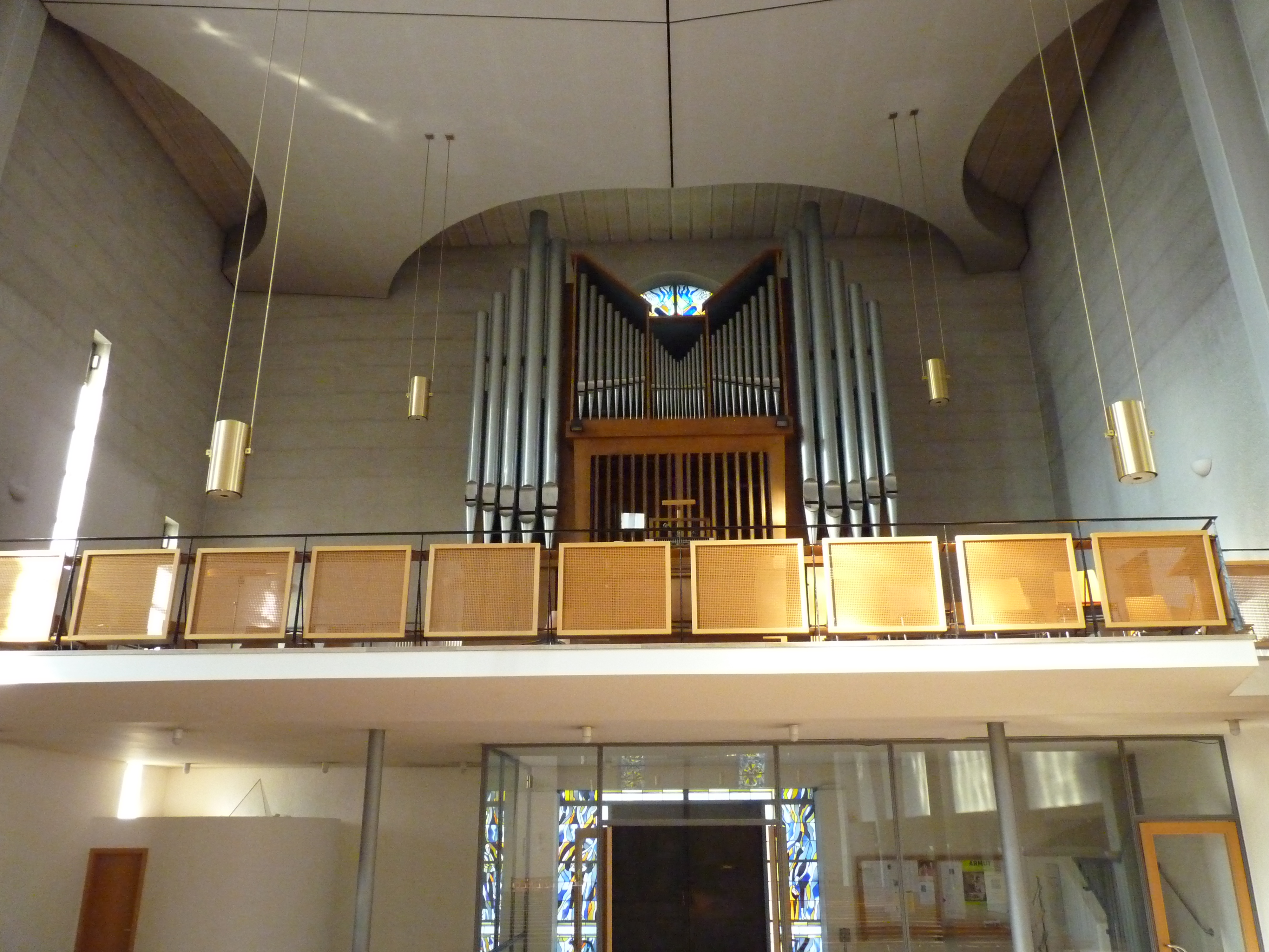 Die 1961 erbaute Walcker-Orgel über dem Haupteingang der Wengenkirche in Ulm